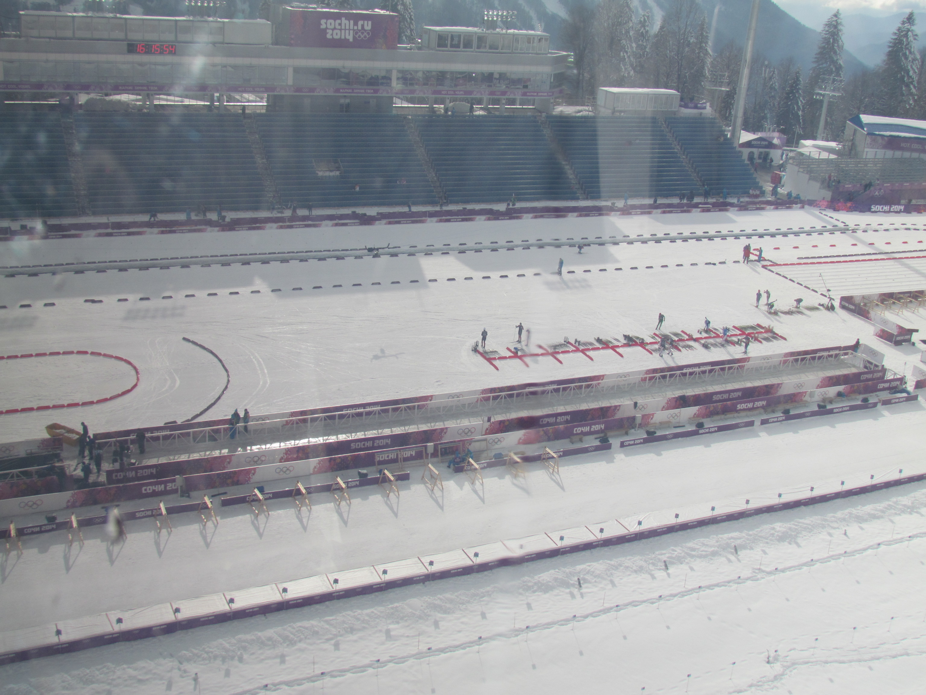 Лижно-біатлонний комплекс «Лаура» (смт Красна Поляна, Сочі, Краснодарський край) під час Олімпійських ігор